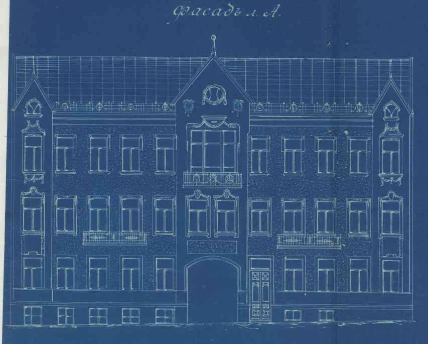 Праект рэканструкцыі дома Ліўшыца ў Менску.